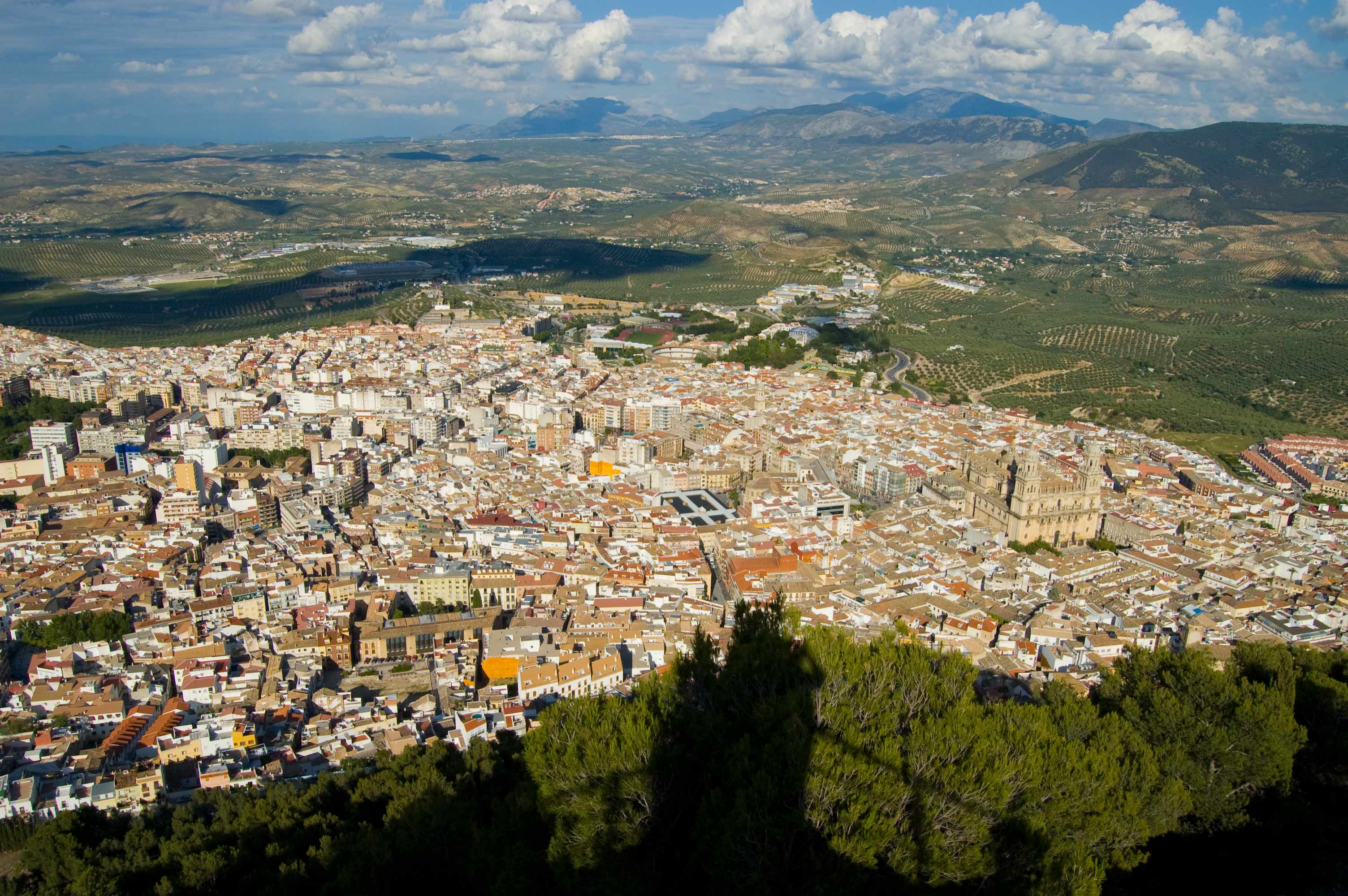 Jaén, España, vista aérea.